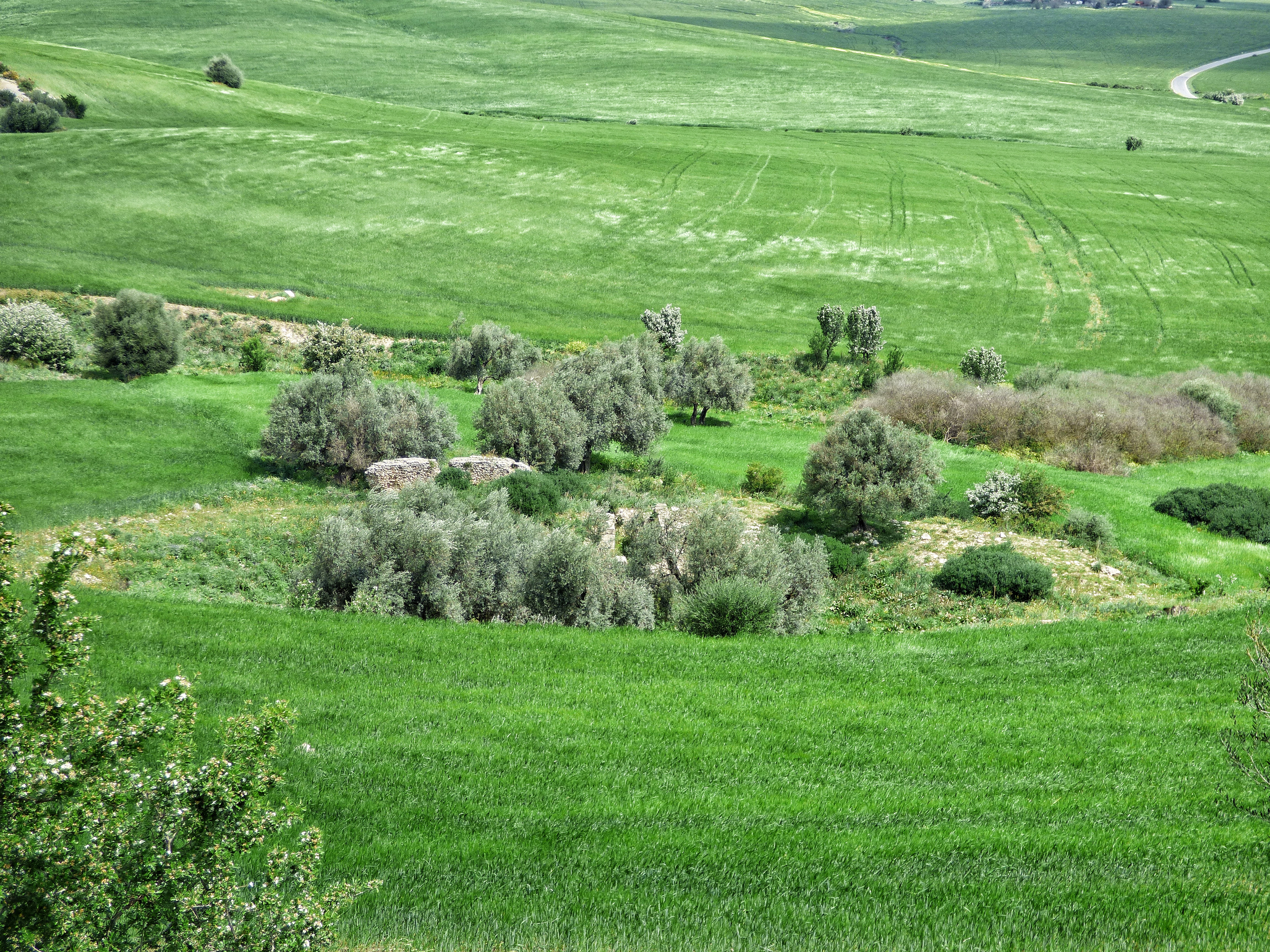 amphithéâtre cite romaine uchi maius rihana